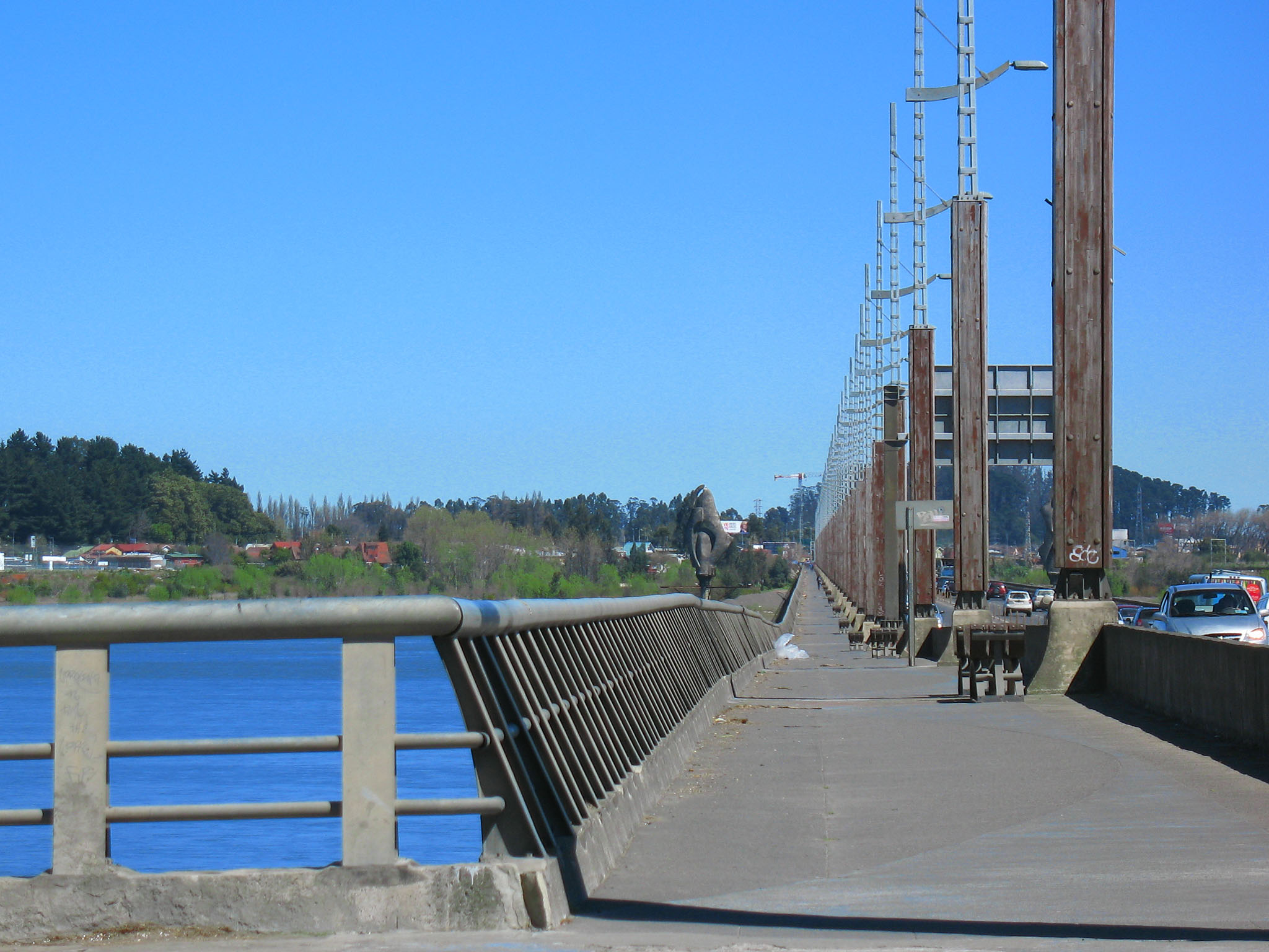 Concepcion, puente 1,9 Kms